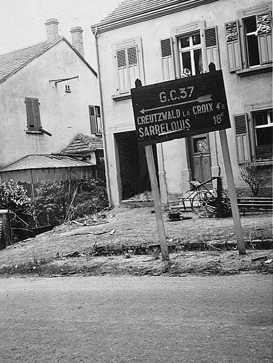 Carling (Moselle, France), photographie prise par un soldat allemand en 1940 dans le village évacué vidé de ses habitants.